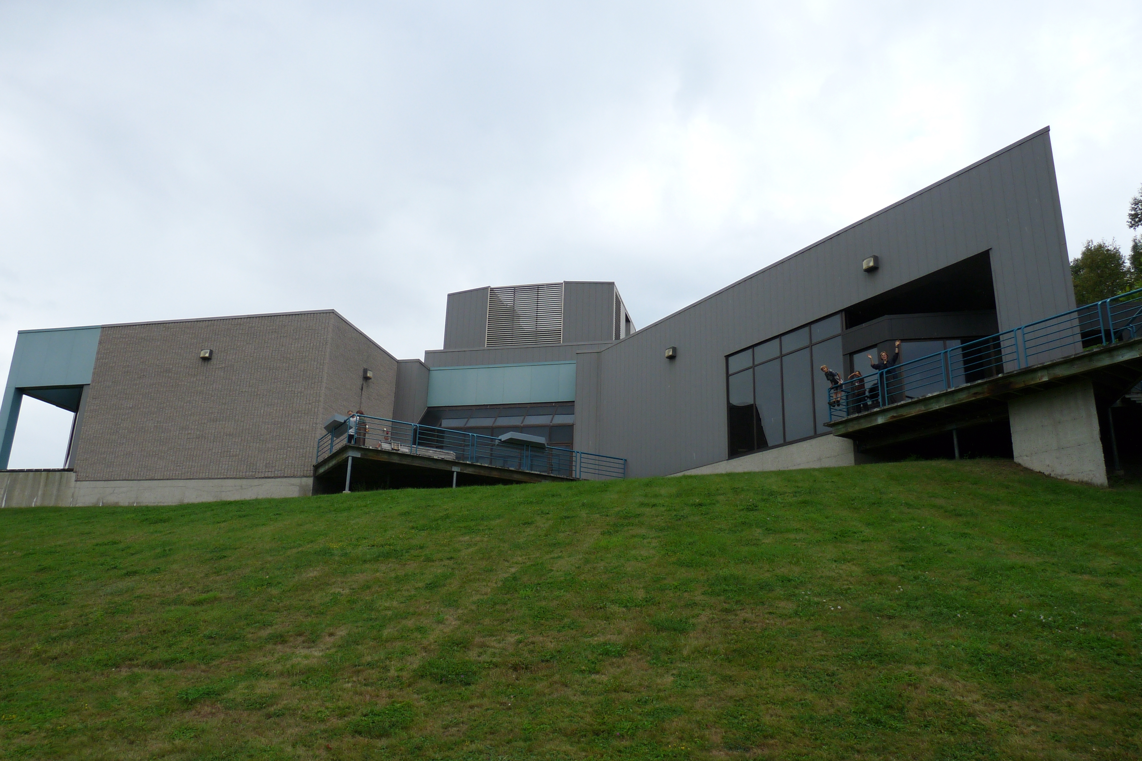 Musée du site historique de la bataille de la Ristigouche